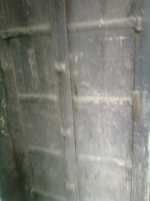 १७८0मध्ये नाना फडणवीस यांनी शनीवार वाड्याजवळ बांधलेल्या नाना वाड्याचा दरवाजा